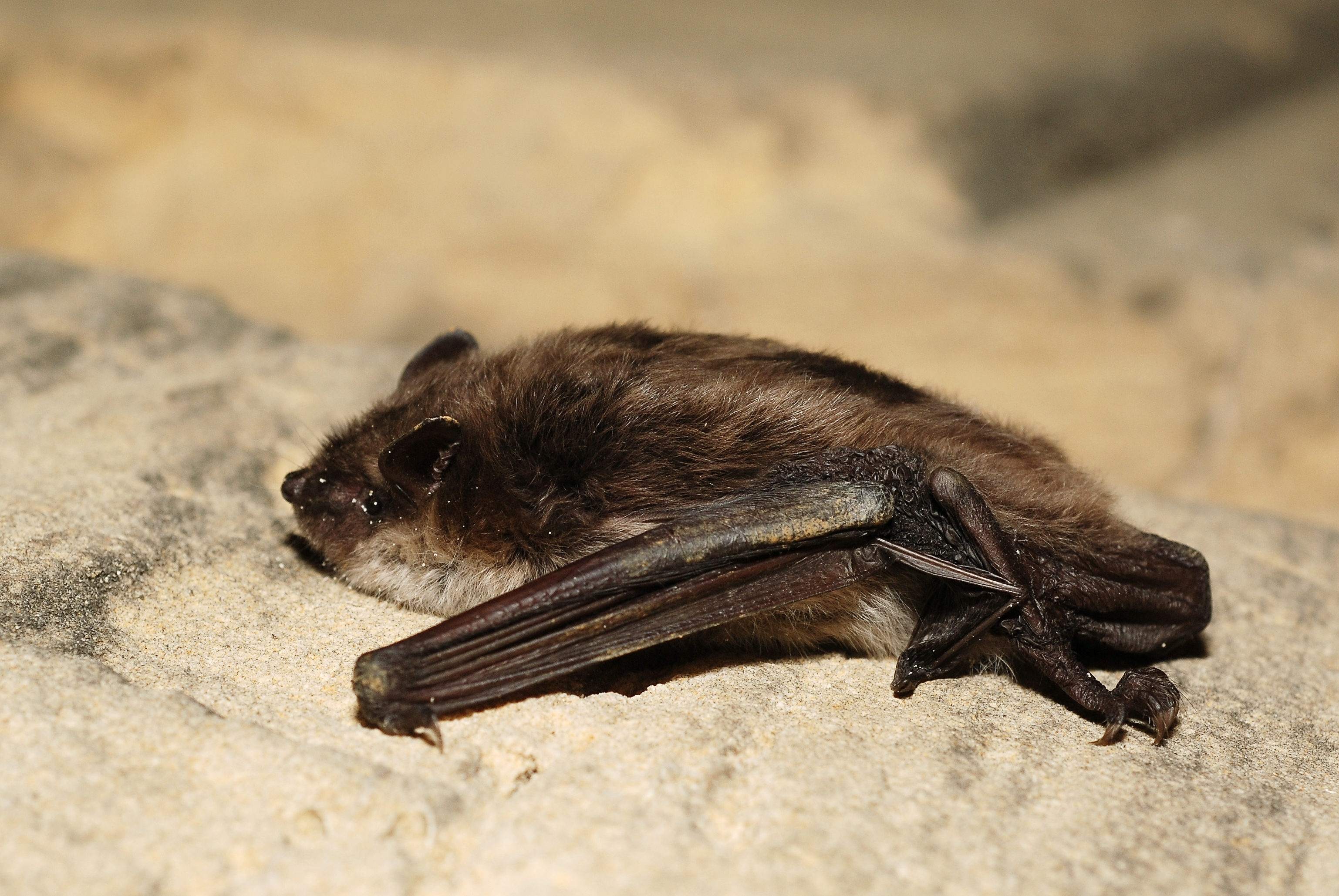 Myotis dasycneme